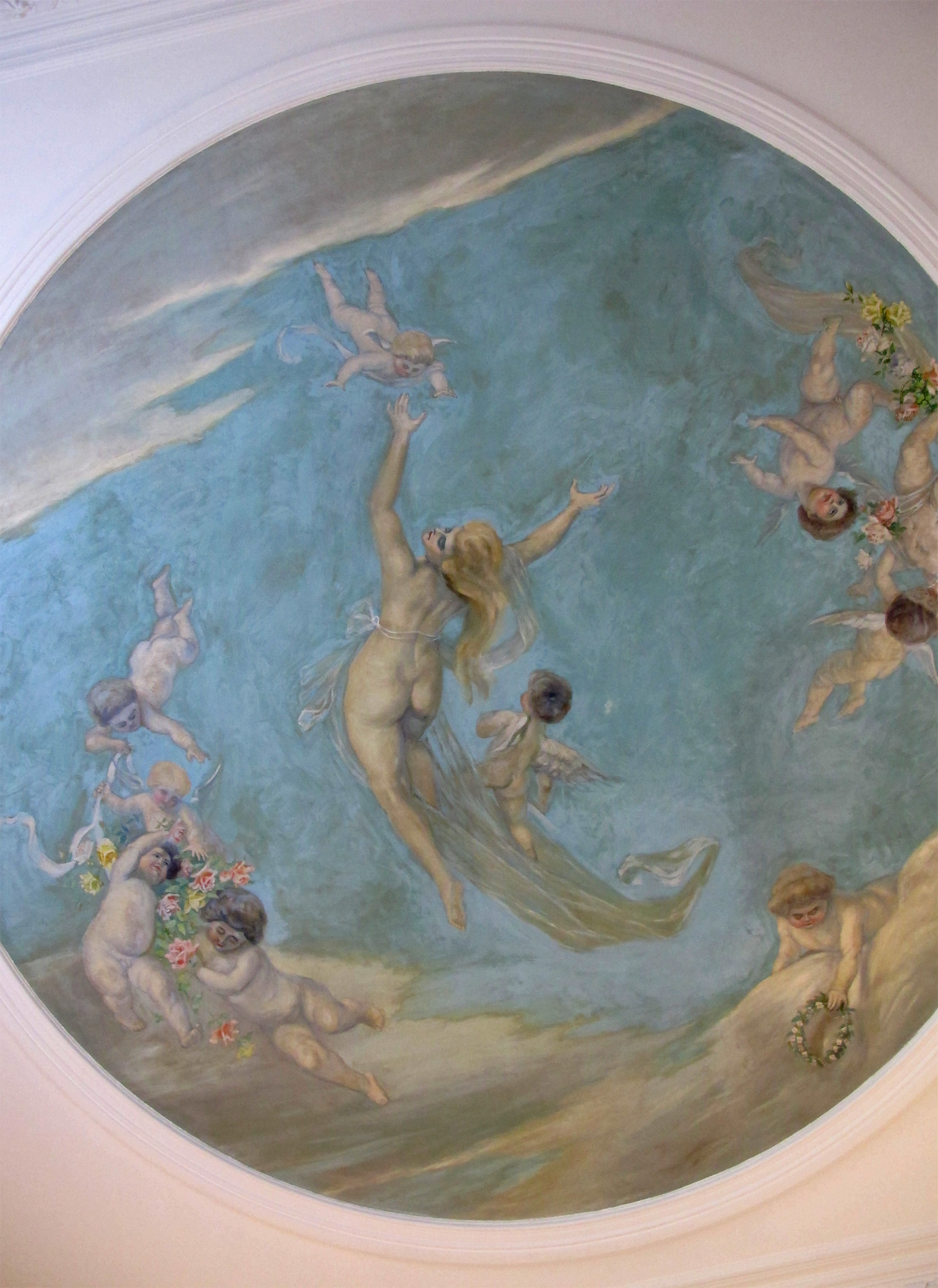 ceiling paintig